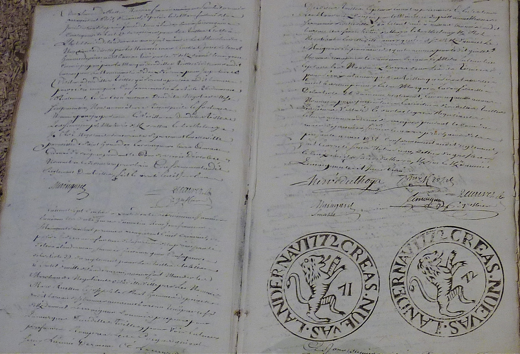 Livre d'enregistrement de la marque des toiles de Landerneau (1783-1791) (collection de la Ville de Landerneau)